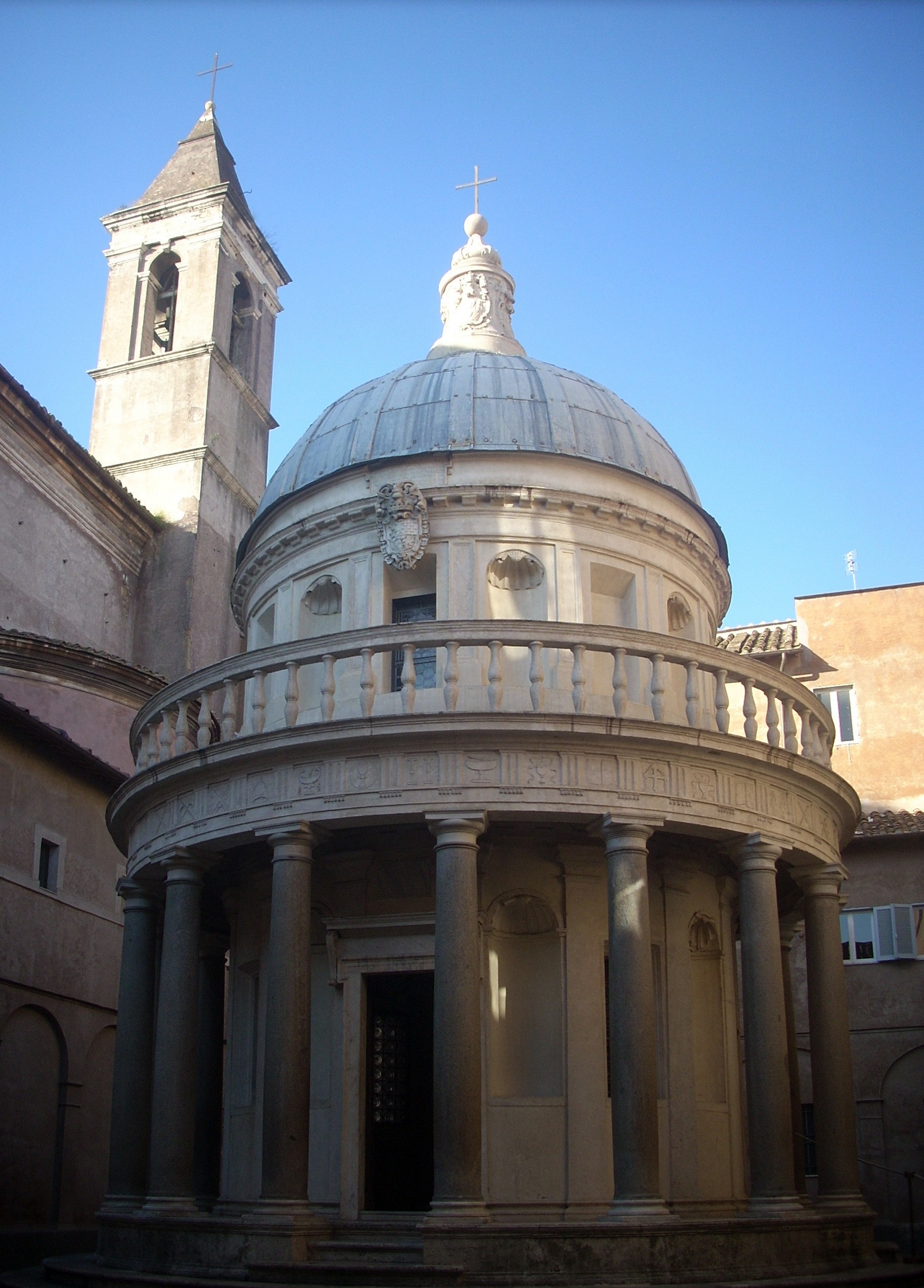 Tempietto del Bramante col campanile di S. Pietro in Montorio